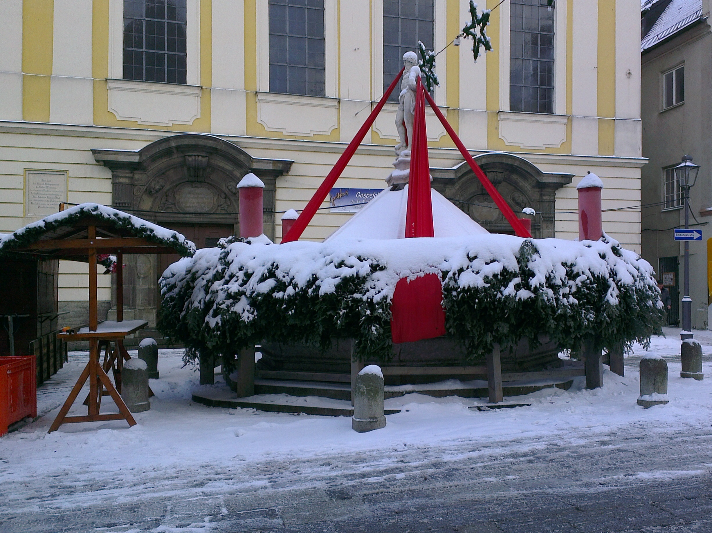 Kaufbeuren/Allgäu, größter (echter) Adventskranz der Welt, in den der Neptunbrunnen (Kaiser-Max-Straße) zur Adventszeit verwandelt wird